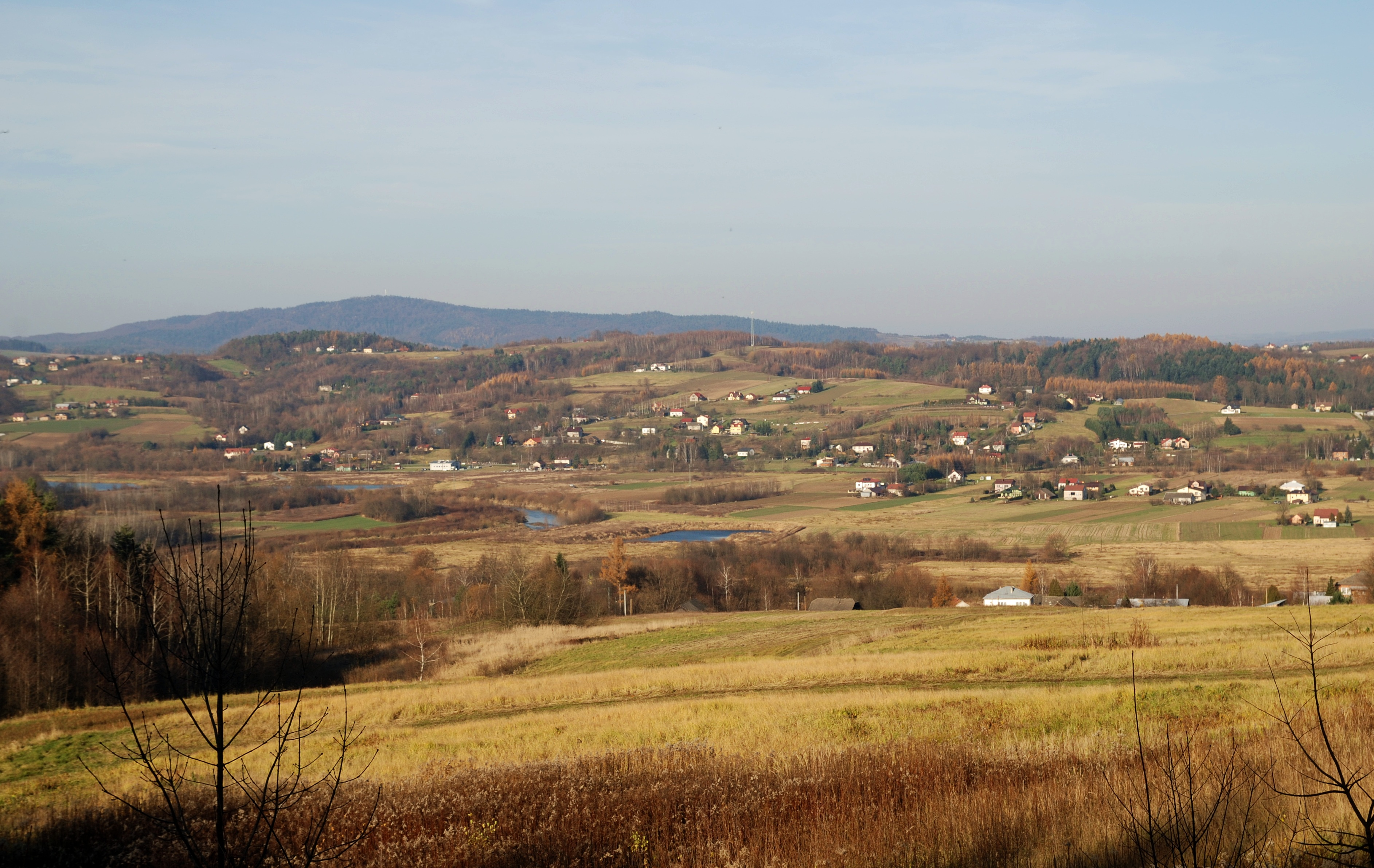 wieś Przysieki